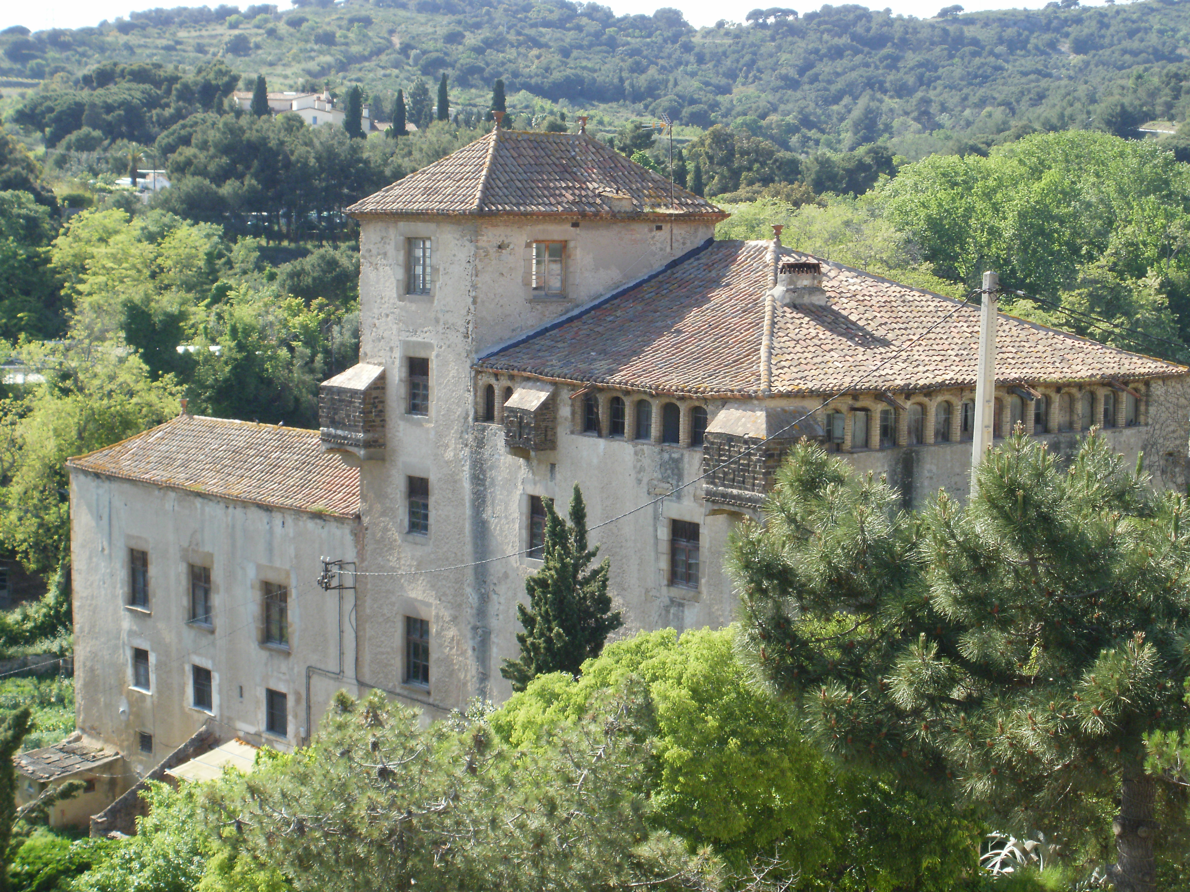 Gran casal fortificat documentat des del segle XIV tot i que l'edifici actual és d'època posterior, probablement del segle XVI. Està format per tres cossos, un de més baix, de planta baixa i dos pisos, un altre de més alt, amb un pis més i golfes, i la torre de planta rectangular entremig. A l'altura de les golfes hi ha tres grans matacans. Les finestres tenen totes la llinda, els brancals i l'ampit de pedra. A l'interior es conserva un celler gòtic. La casa va ser reformada per Josep M. Jujol el 1943. L'any 2003 va ser adquirida per l'Ajuntament de Badalona.